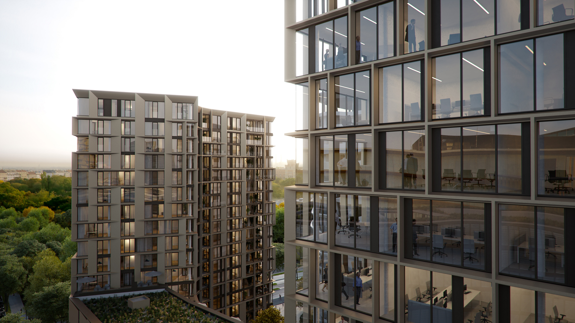 Blick auf den Turm der Bel & Main Residences bei Abenddämmerung